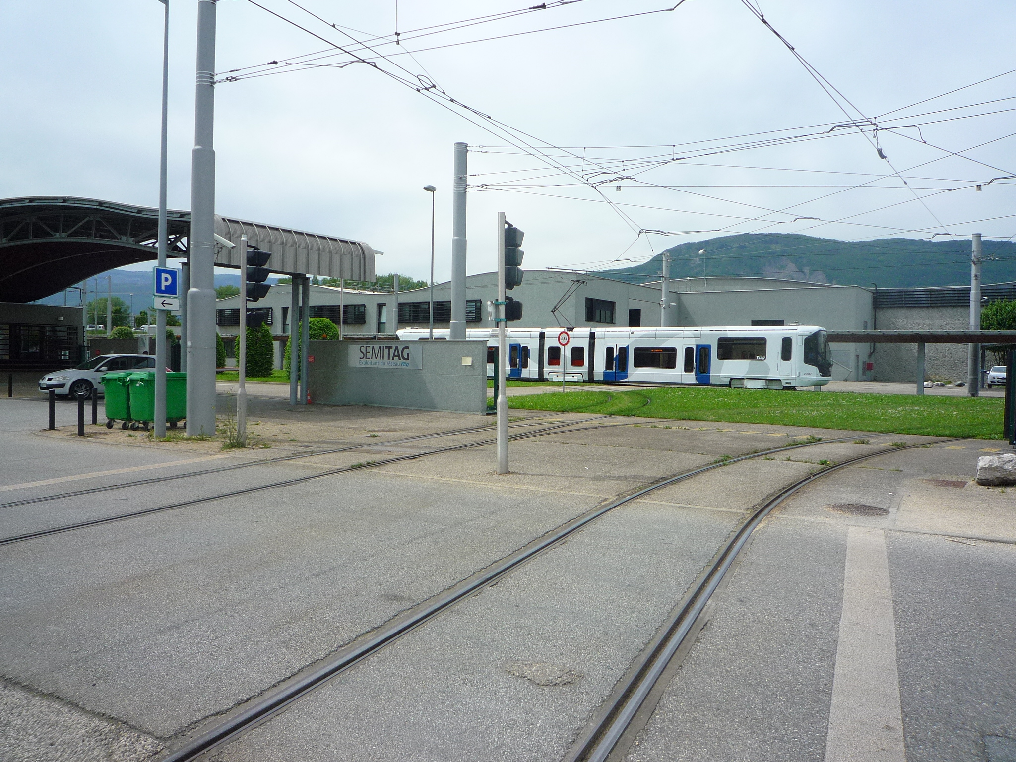 Tramway de la ligne E circulant dans le dépôt de tramway de Grenoble-Gières.